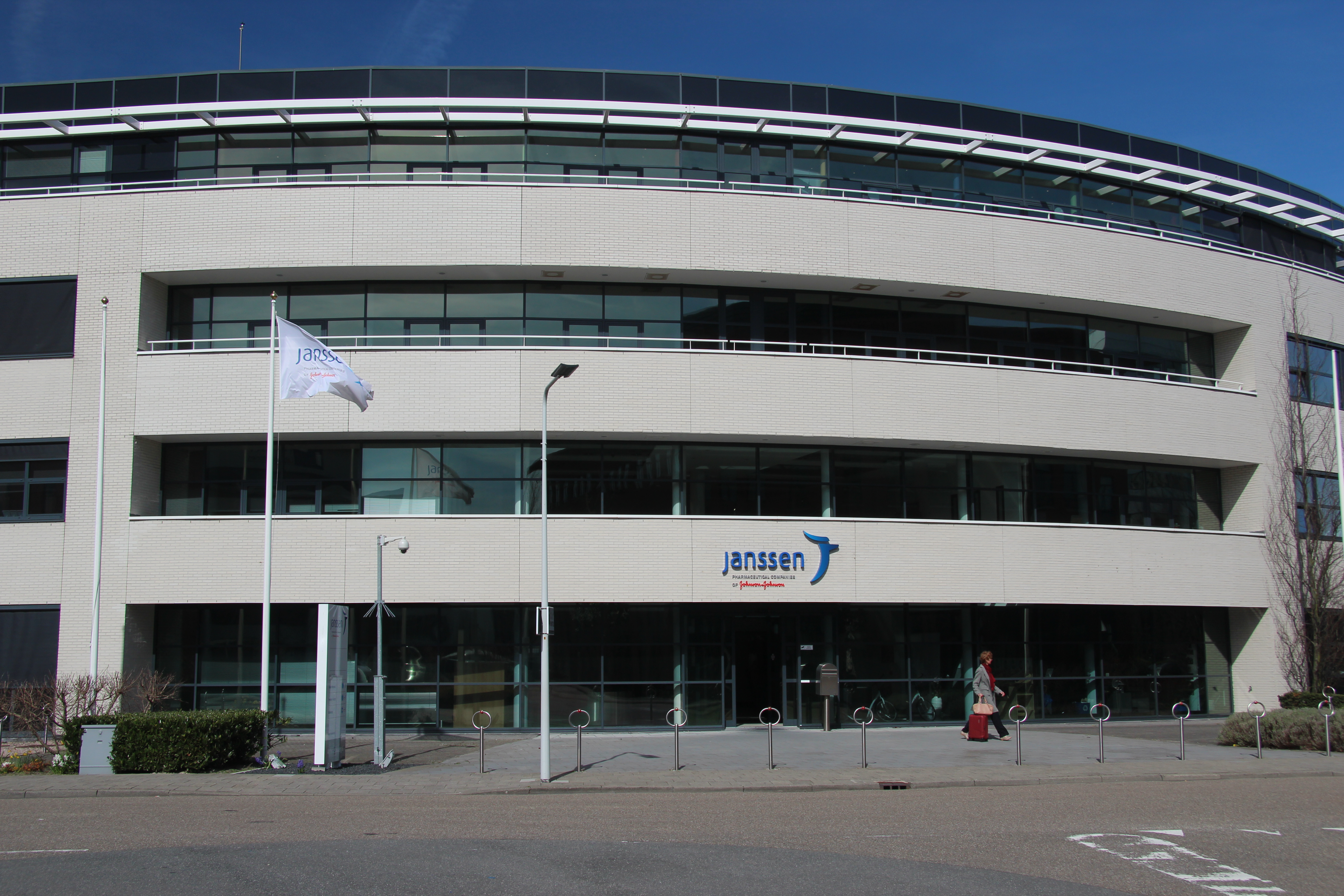 Eén van de gebouwen op het Leiden Bio Science Park van Janssen Pharmaceutical Companies, de bundeling van alle farmaceutische activiteiten van Johnson & Johnson onder de naam “Janssen”.